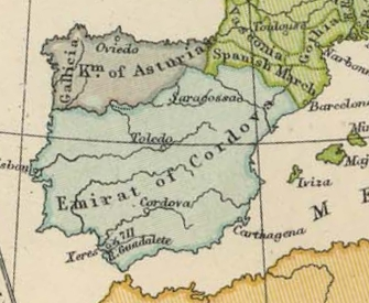 La península ibérica el año 814